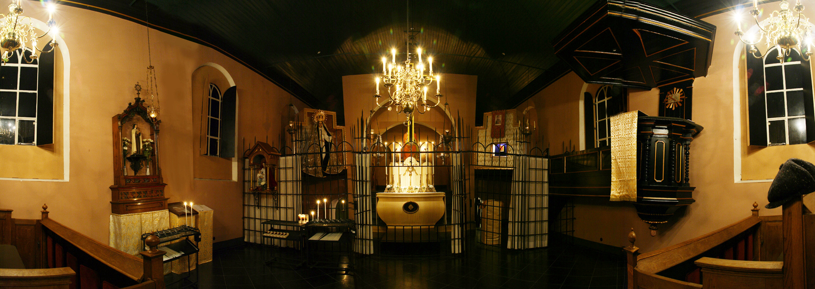 Zelf gemaakt